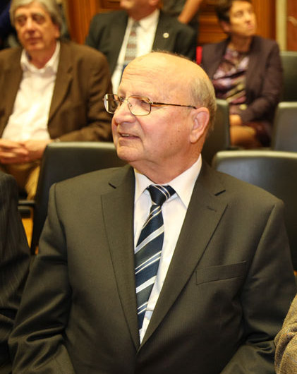 Gerulf Stix, Harald Ofner-9069